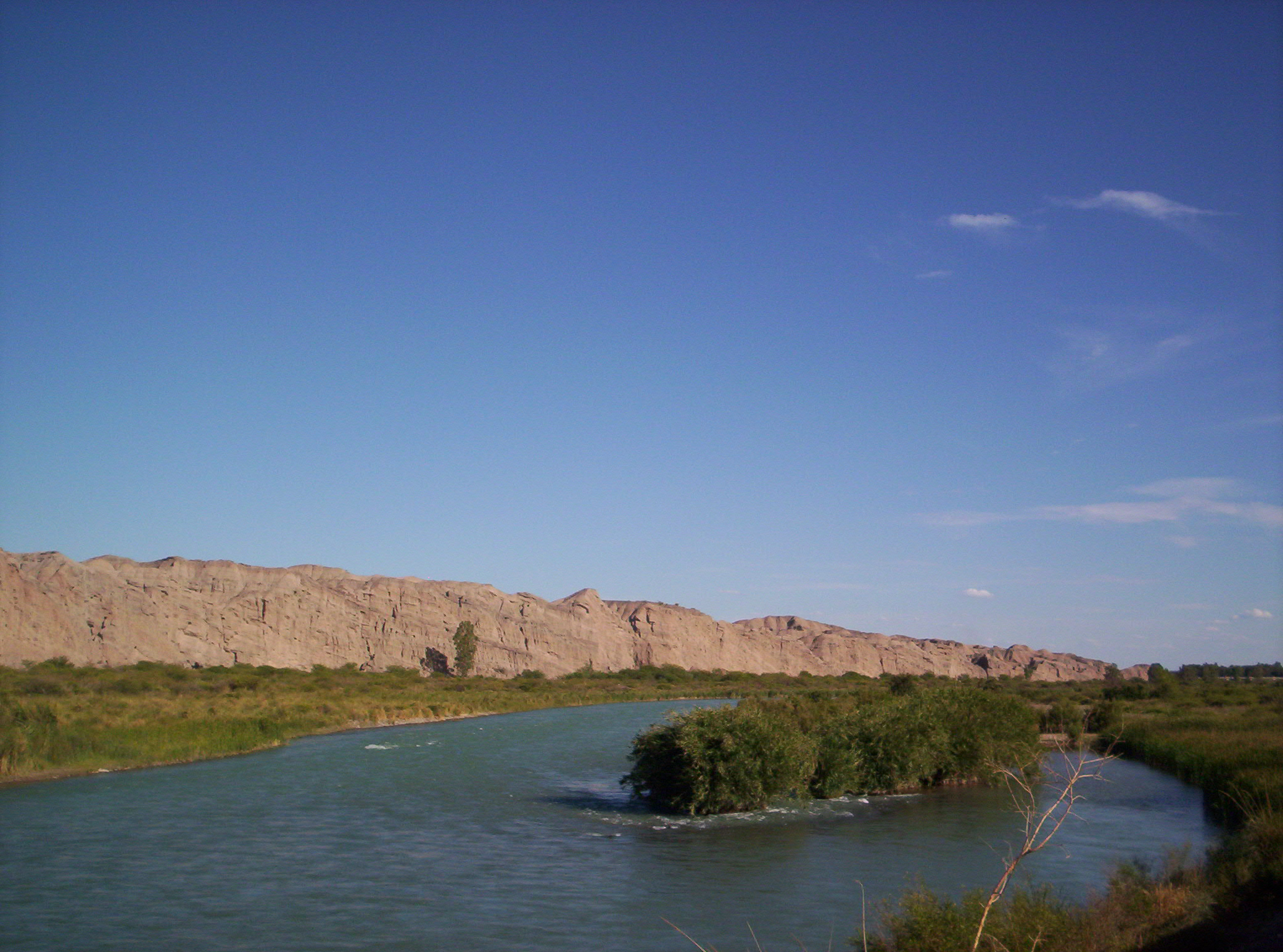 Fotografía del Río San Juan, provincia homónima, Argentina